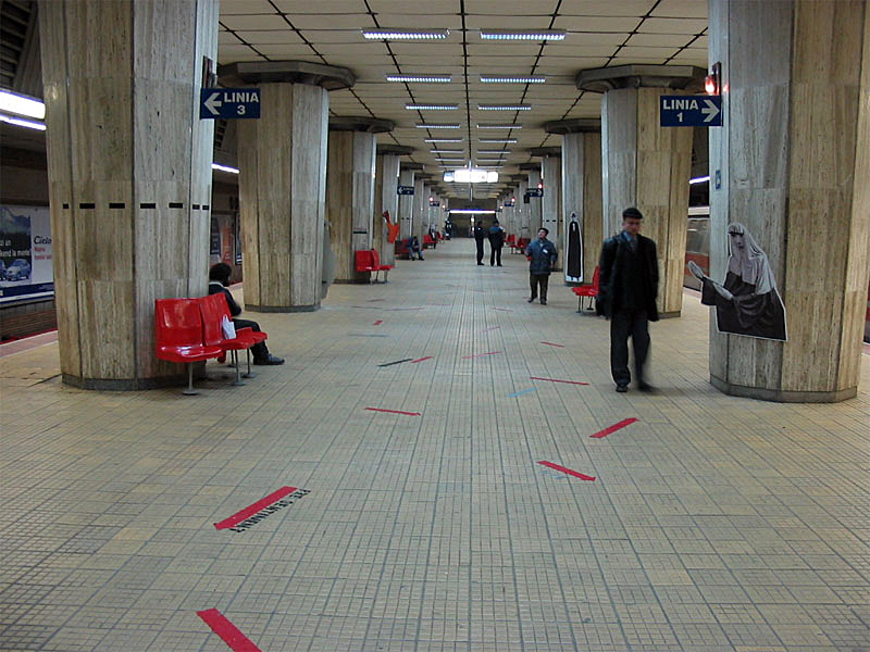 Le quai central de la station.